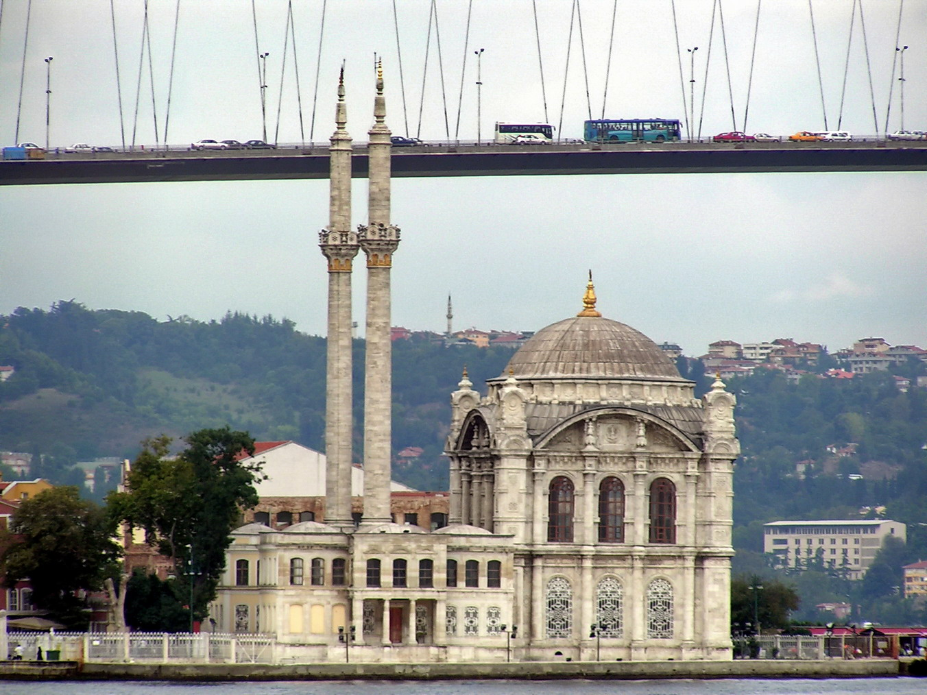 Bosporus-Brücke in Istanbul über Ortaköy-Moschee am Bosporus